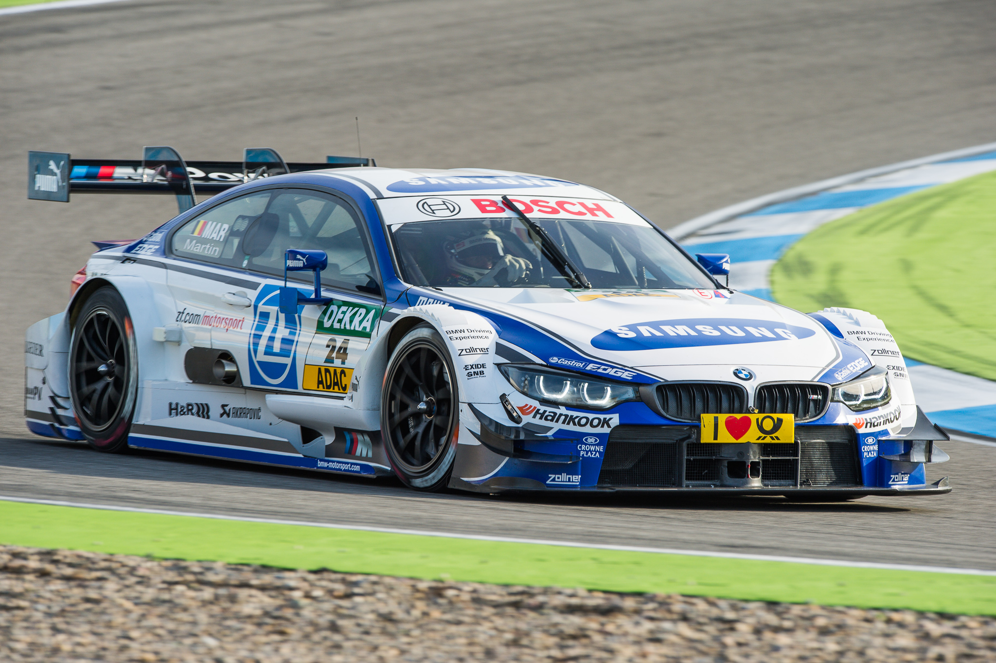 DTM,Deutsche Tourenwagen Masters,Hockenheimring,Maxime Martin,Motorsport,RMG,Reinhold Motorsport GmbH,Samsung BMW M4 DTM